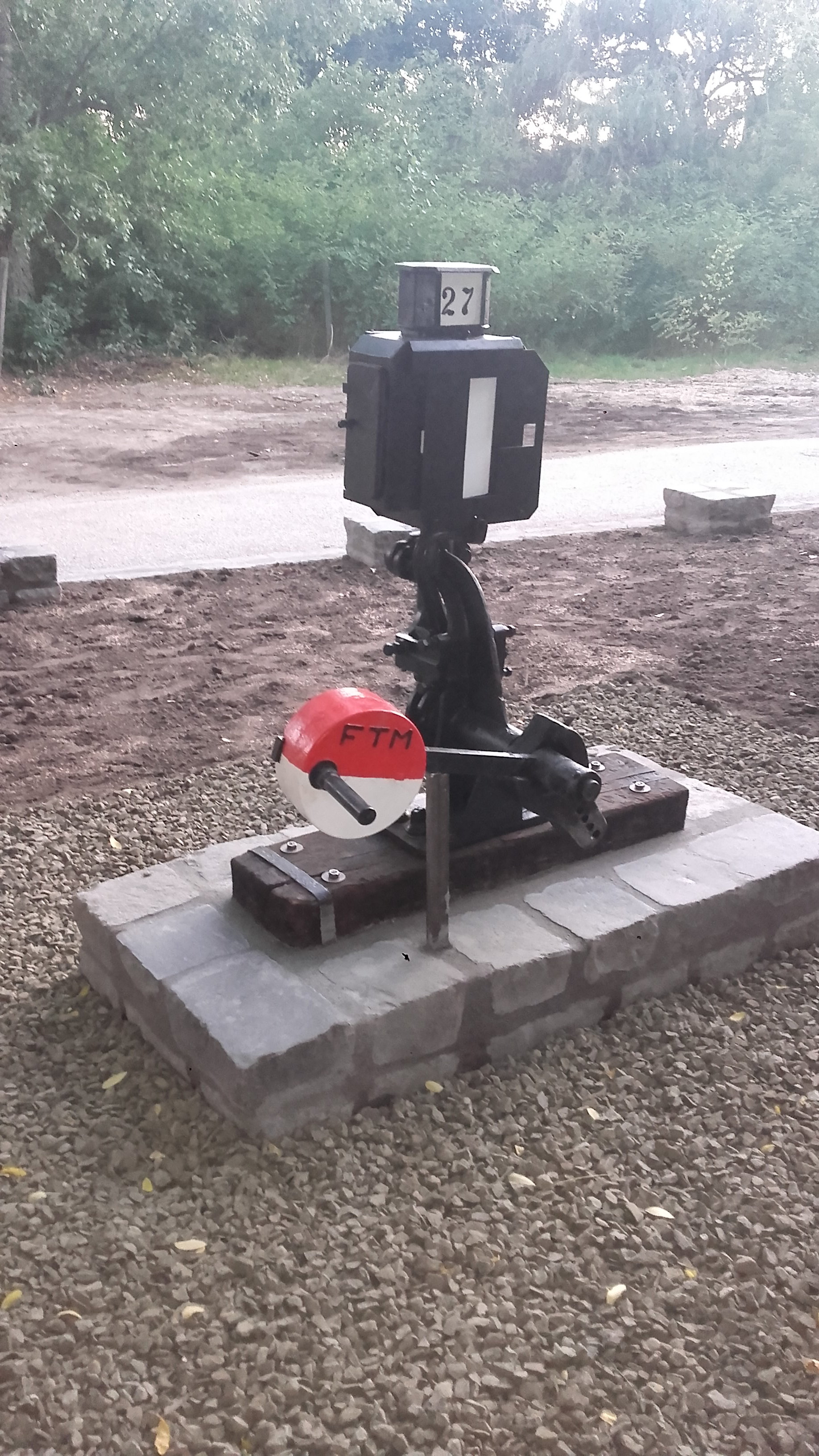 A vasútvonal emlékére 2019-ben kiállított váltóállító készülék, Gödöllőn a Felsőöreghegy állomásépület mellett